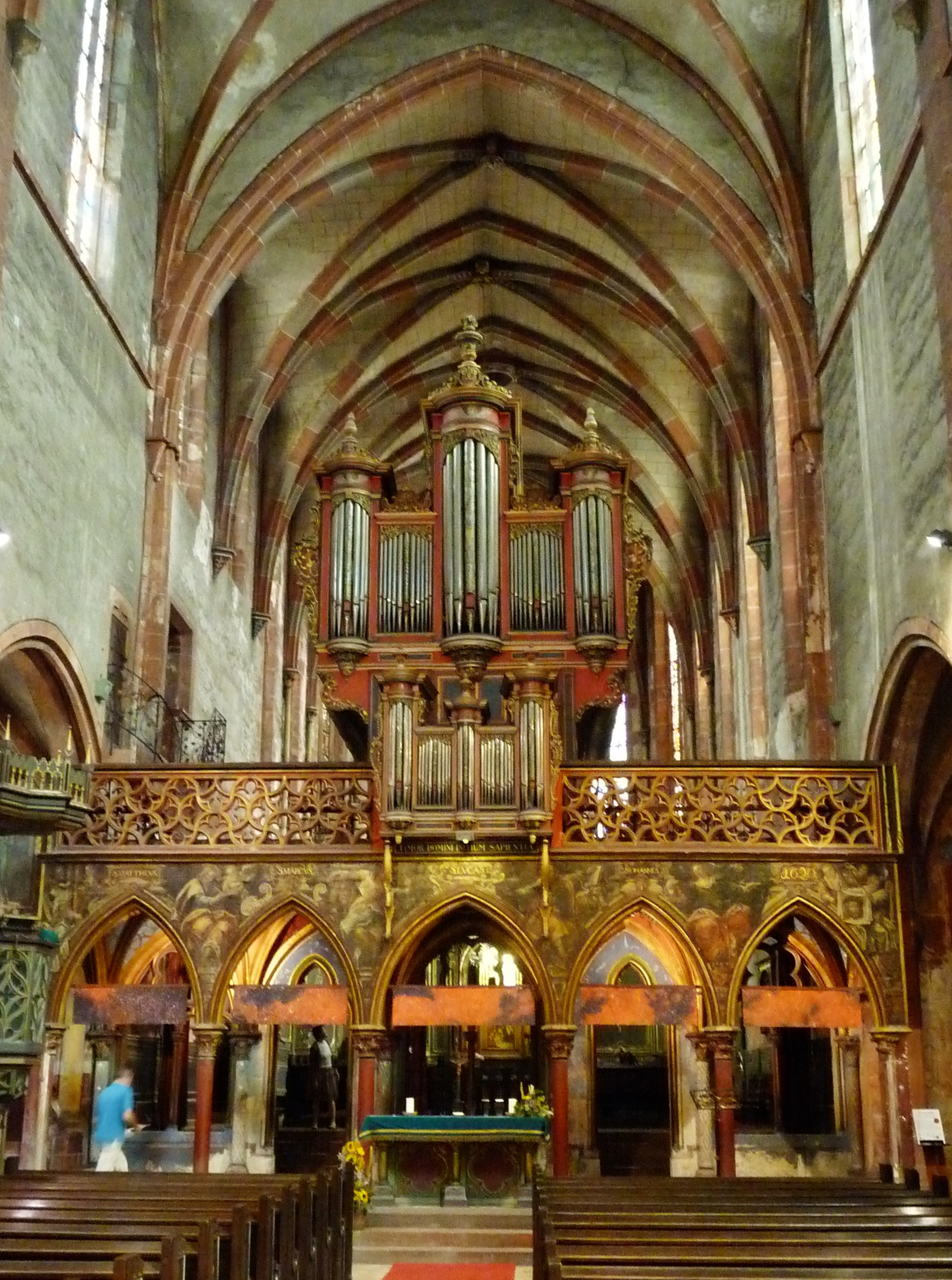 Strasbourg - Saint-Pierre-le-Jeune Protestant - Intérieur